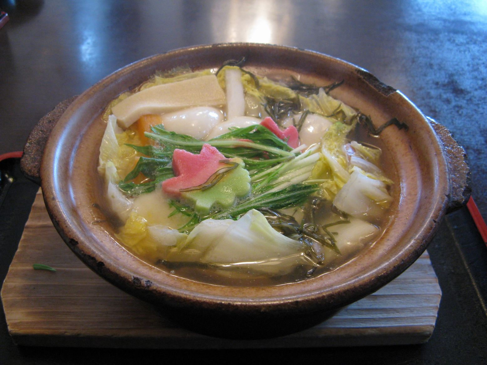 具雑煮 長崎県諫早市内にて